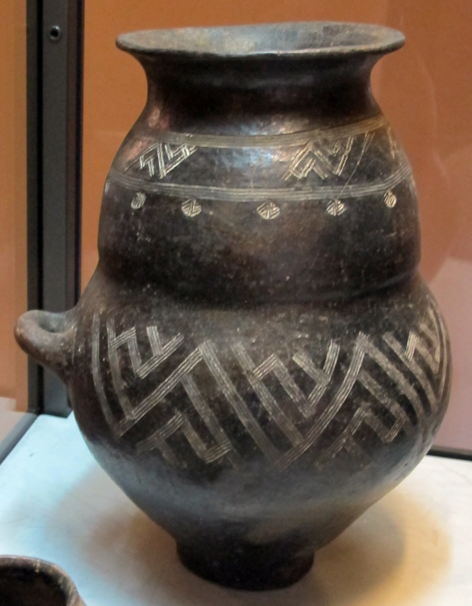 Museo Claudio Faina